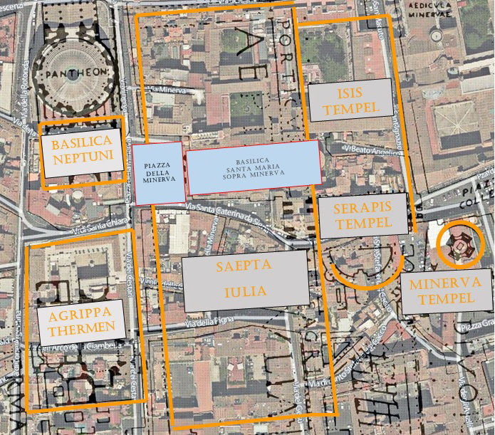 Piazza della Minerva (Rom); Historische Topographie